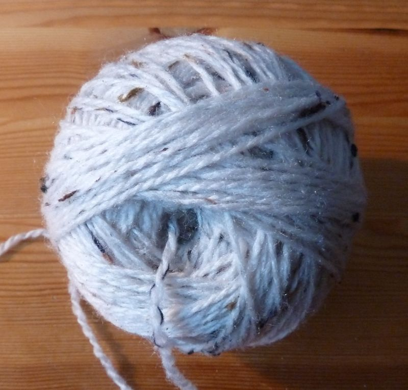 handgewickeltes Wollknäuel, bei dem der Faden aus dem Inneren herausgezogen wird.